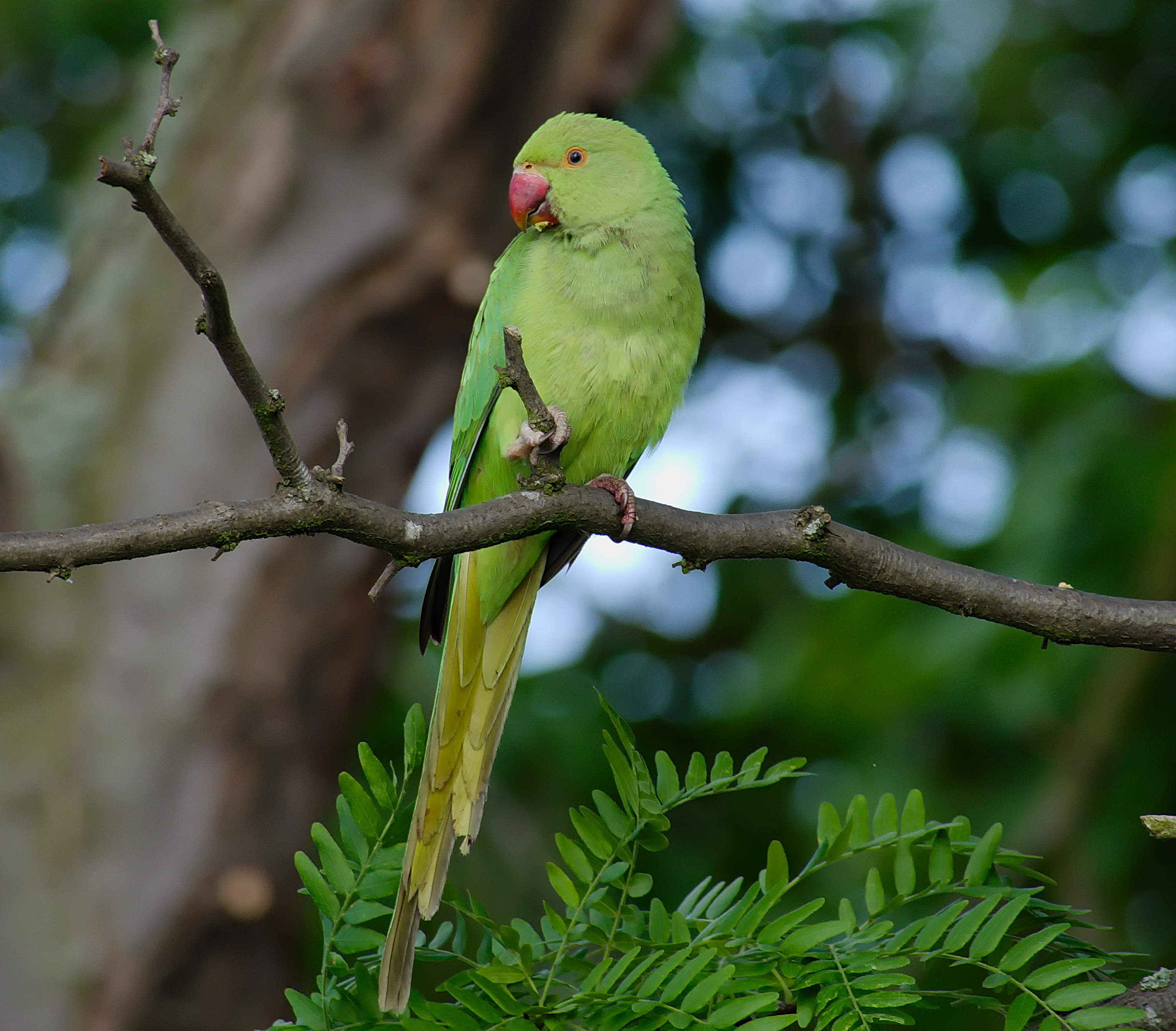 Halsbandsittich - Psittacula krameri, Weibchen. Aufgenommen in Mannheim am Vogelstangsee, Baden-Württemberg, Deutschland.